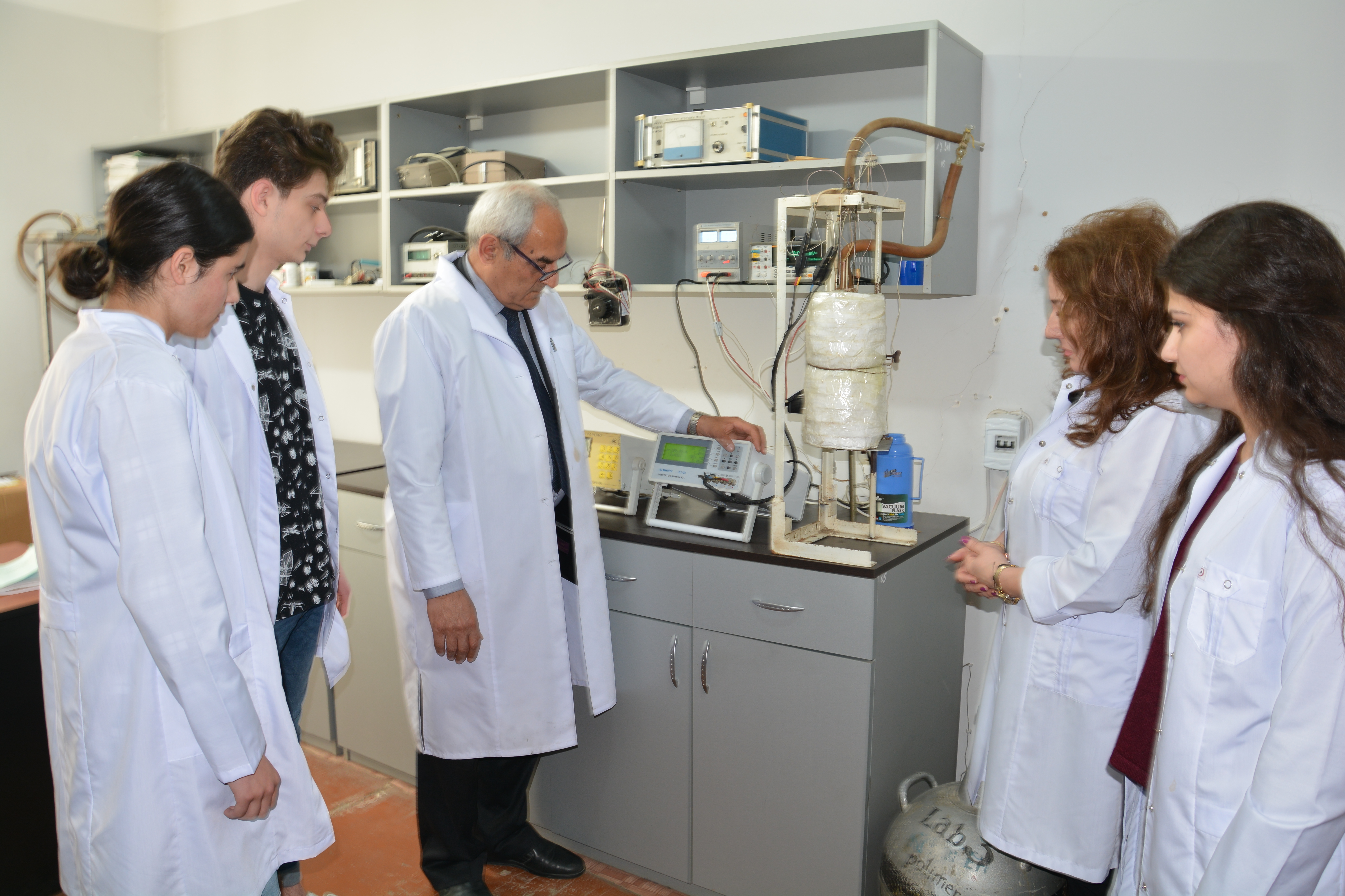 Oqtay Əbil oğlu Səmədov